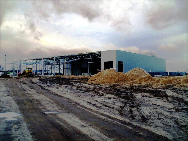 Największe w północnej Polsce centrum blacharsko-lakiernicze Mojsiuk w Starych Bielicach (gm. Biesiekierz) pod Koszalinem.